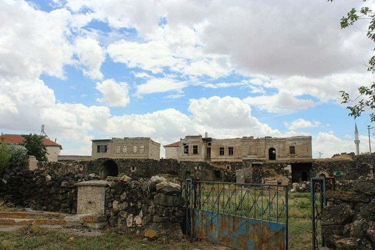 Nevşehir'in Gülşehir ilçesine bağlı bir köy olan Eğrikuyu'da bir köy evi.